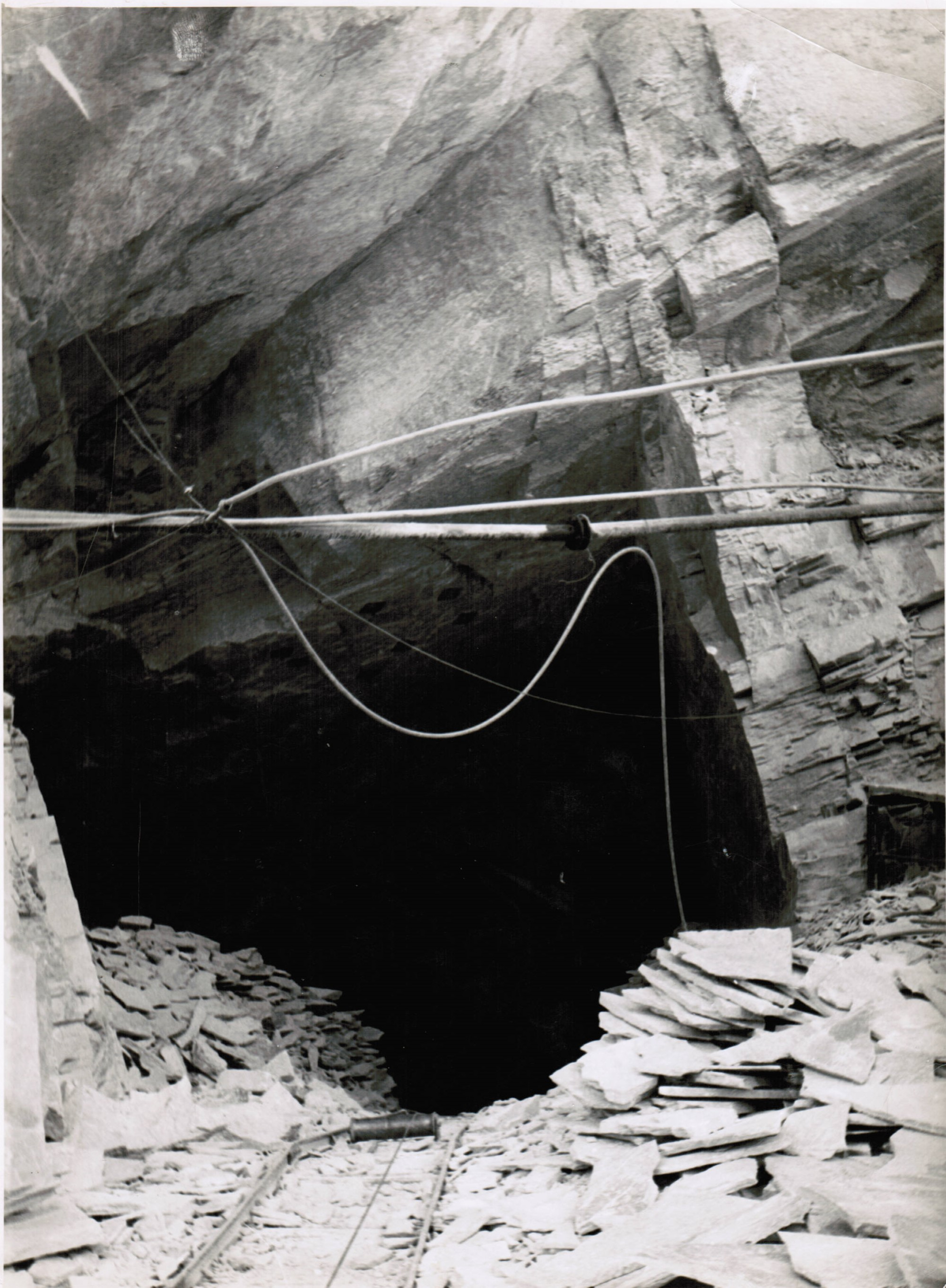 Quarzitplattenbrüche Lochmatter, St. Niklaus Schweizer Kanton Wallis, einer der mehreren Eingänge zu den Stollen.